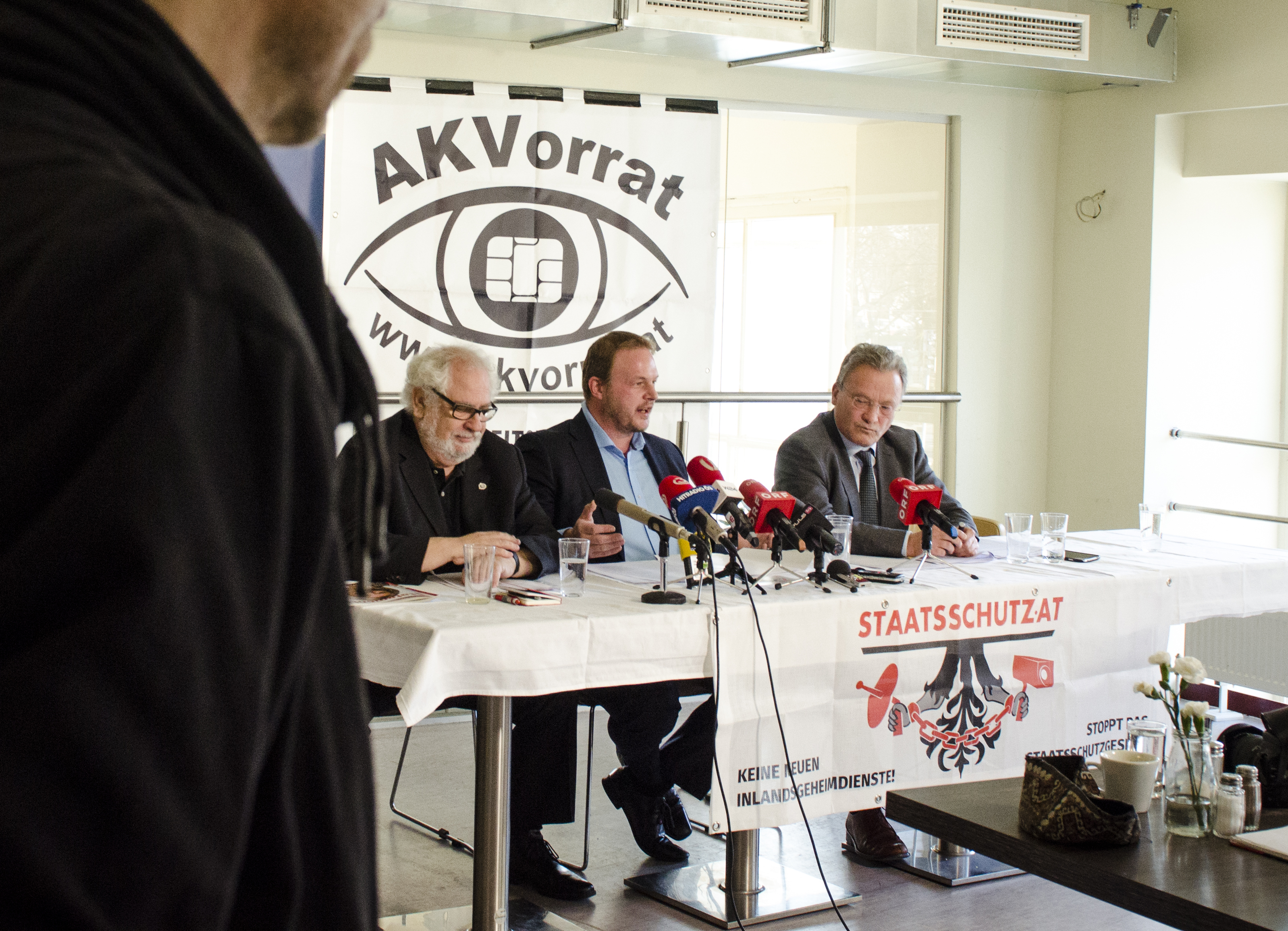 Stoppt das Staatsschutzgesetz. Pressekonferenz von AKVorrat, Österreichischer Rechtsanwaltskammertag und Österreichischer Journalisten Club, 18. Januar 2016 Foto: Bianca Traxler